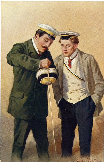 "Couleurdiener beim Speereinziehen" (um 1900). Ein Couleurdiener (Angestellter einer Studentenverbindung), zieht eine scharfe Klinge ("Speer") in einen Korbschläger ein, hier beim Festziehen der Schraubenmutter an der Griffunterseite.